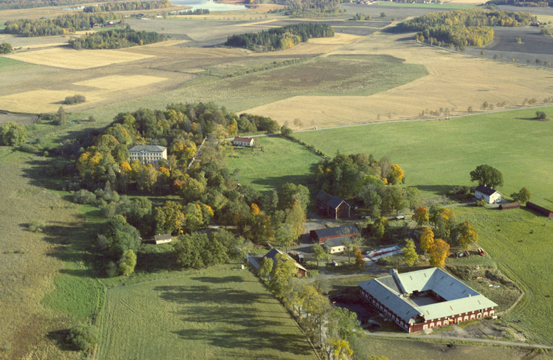 Ökna herrgård / säteri. Bilden är tagen mot (väderstreck): OSO Motiv: Ökna i Floda Nyckelord: Flygbilder, Riksintressen Kategori: Herrgårds-/slottslandskapÖkna herrgård / säteri. Bilden är tagen mot (väderstreck): OSO.